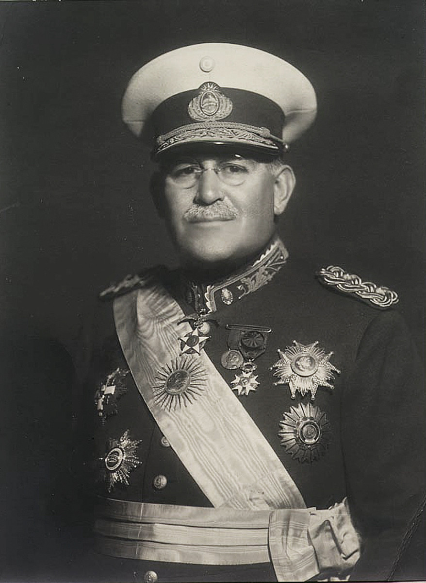 Presidente de la Nación Argentina Agustín Pedro Justo (1932-1938)